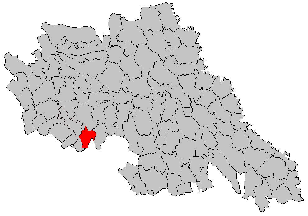 Categorie:Hărţi ale judeţului Iaşi